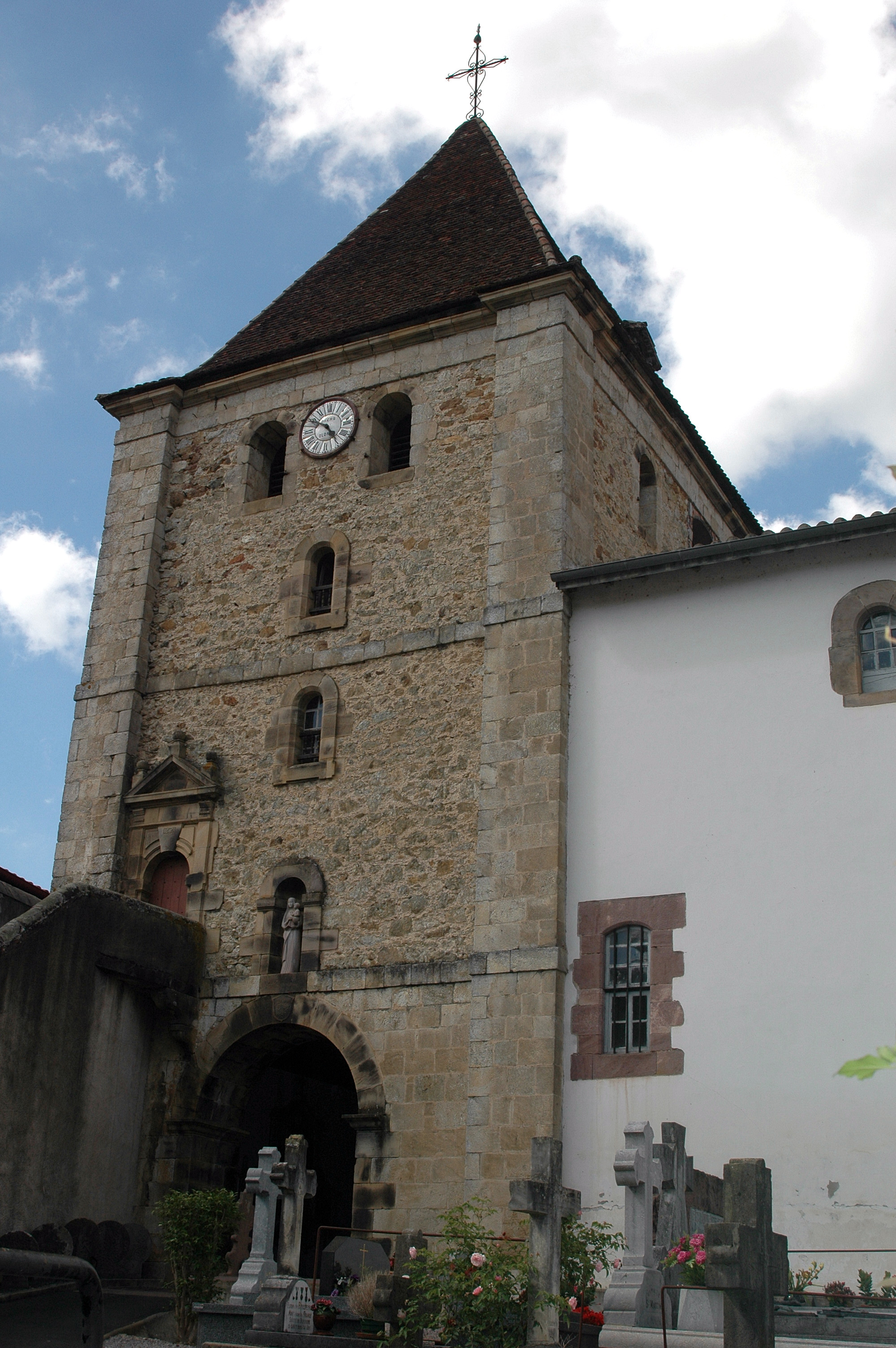 Louhossoa, l'église Notre-Dame-de-l'Assomption. Photo prise le 03/08/06 par Harrieta171